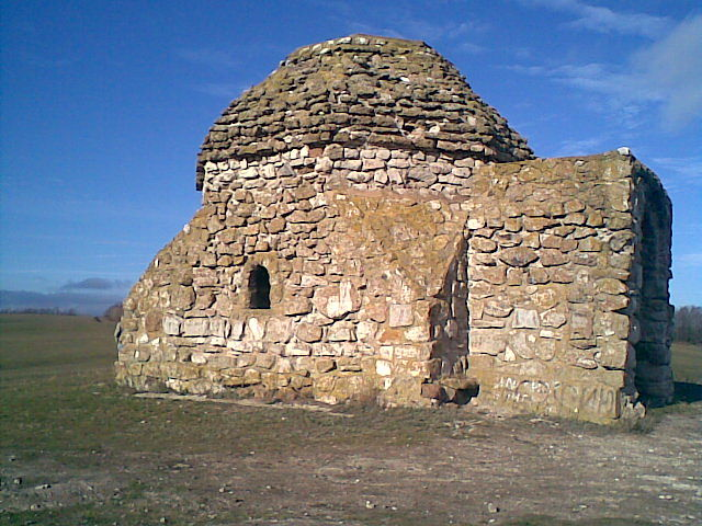 Мавзолей (кашэнэ) Тура-хана, XIV—XV век